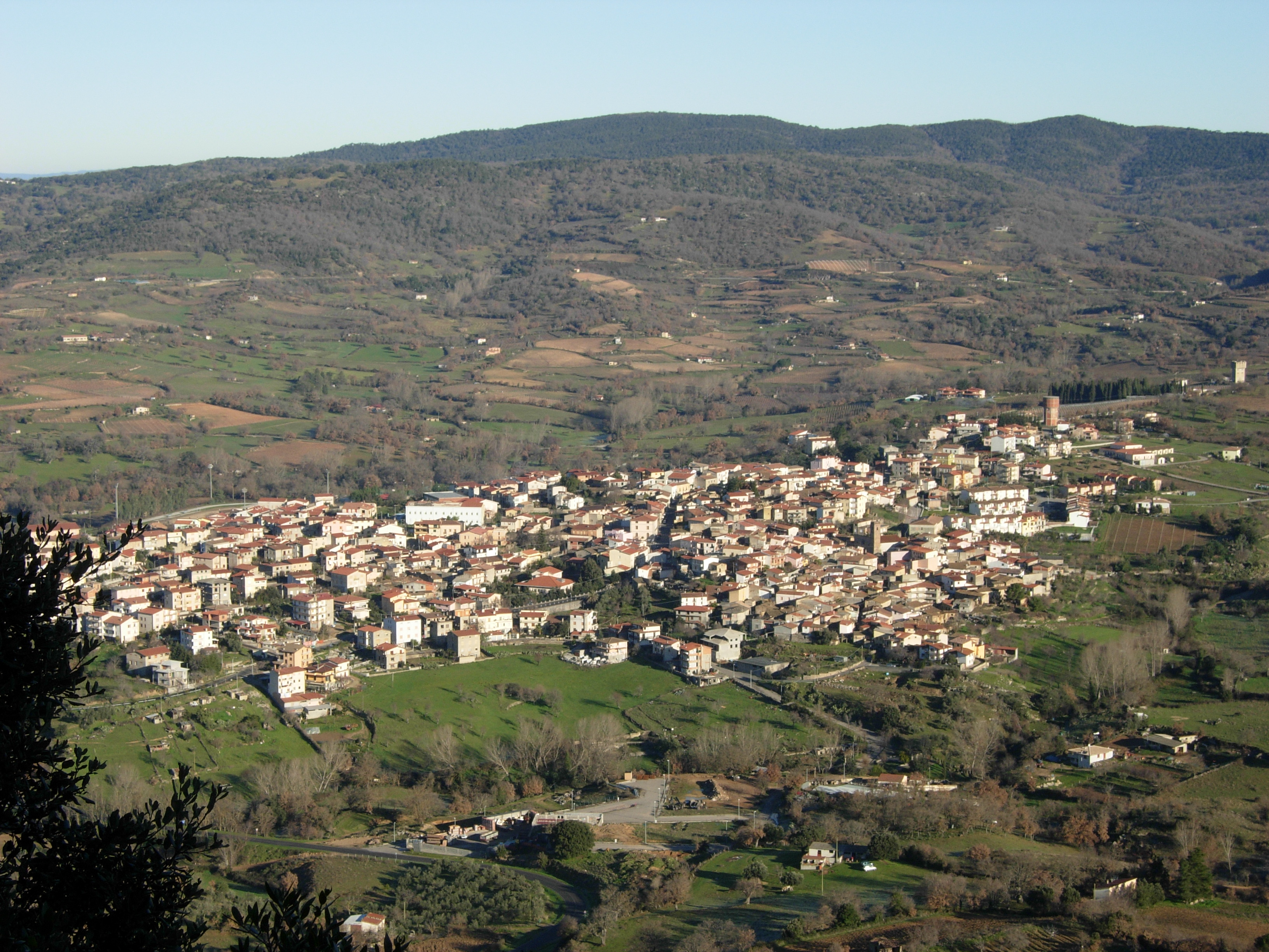 Atzara(NU). Vista da monte Sa Costa.